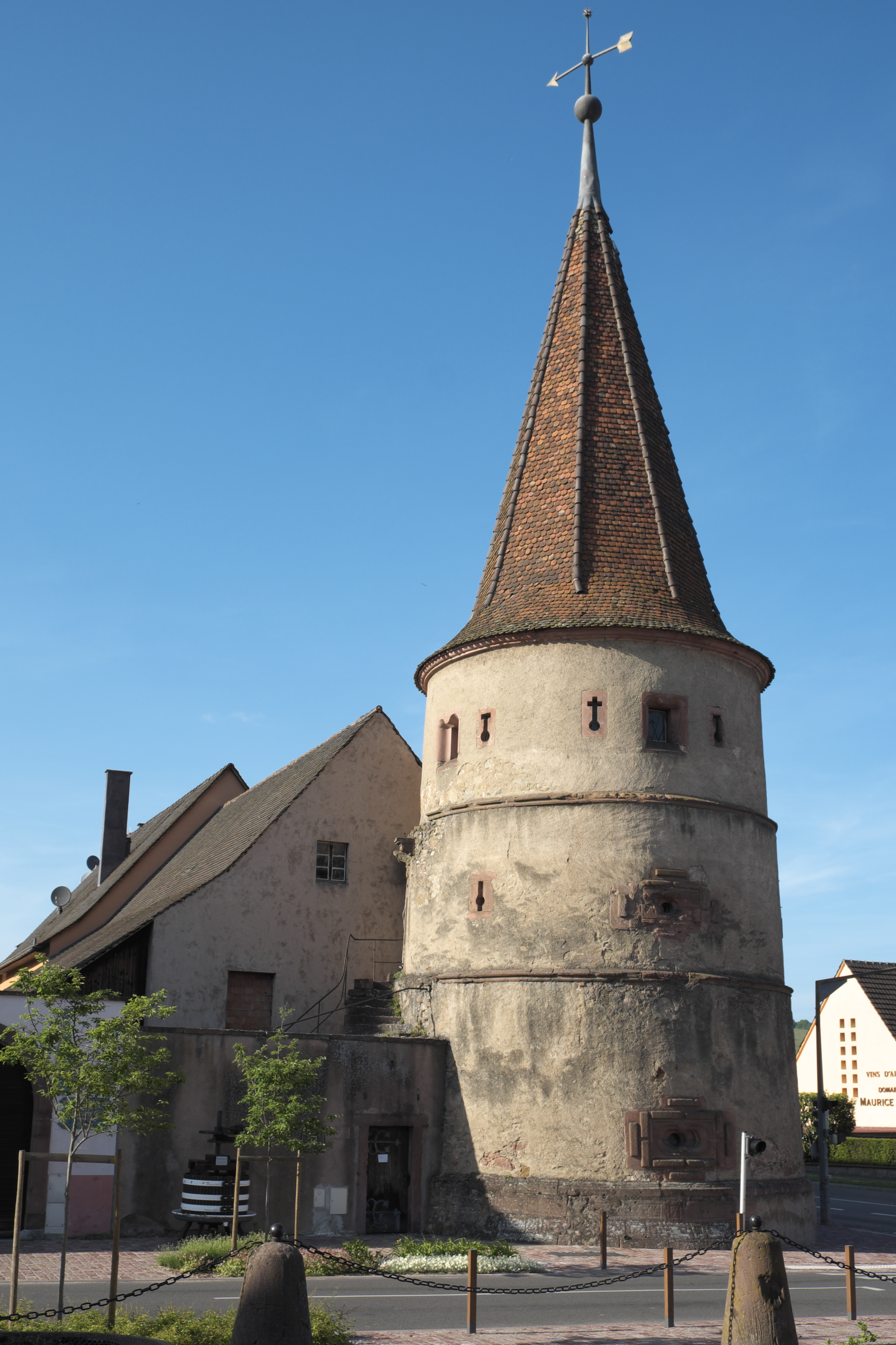 Tour des fripons (Schelmenturm) in Ammerschwihr im Département Haut-Rhin (Elsass/Frankreich), aus dem 16. Jahrhundert